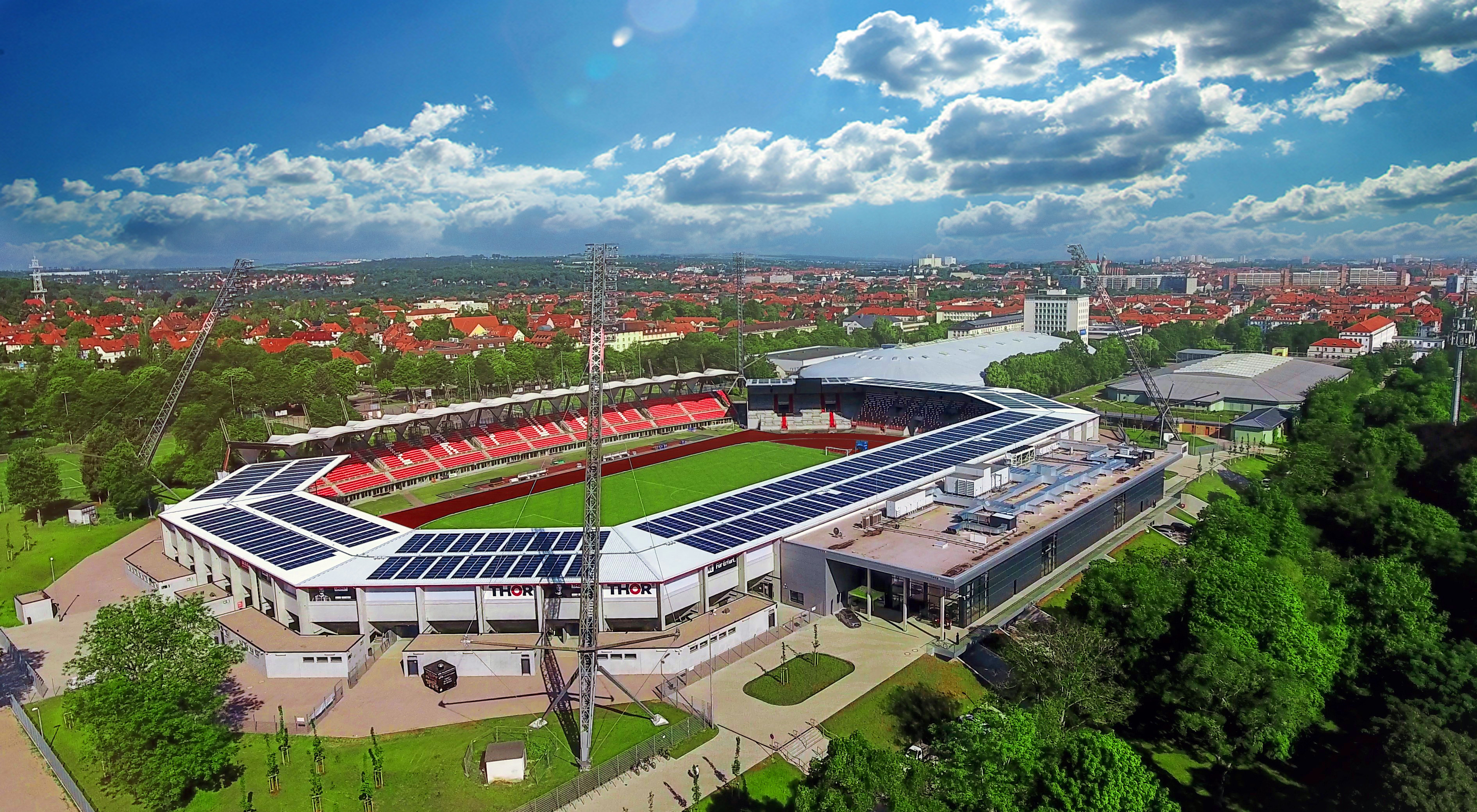 Luftaufnahme des Steigerwaldstadion Erfurt